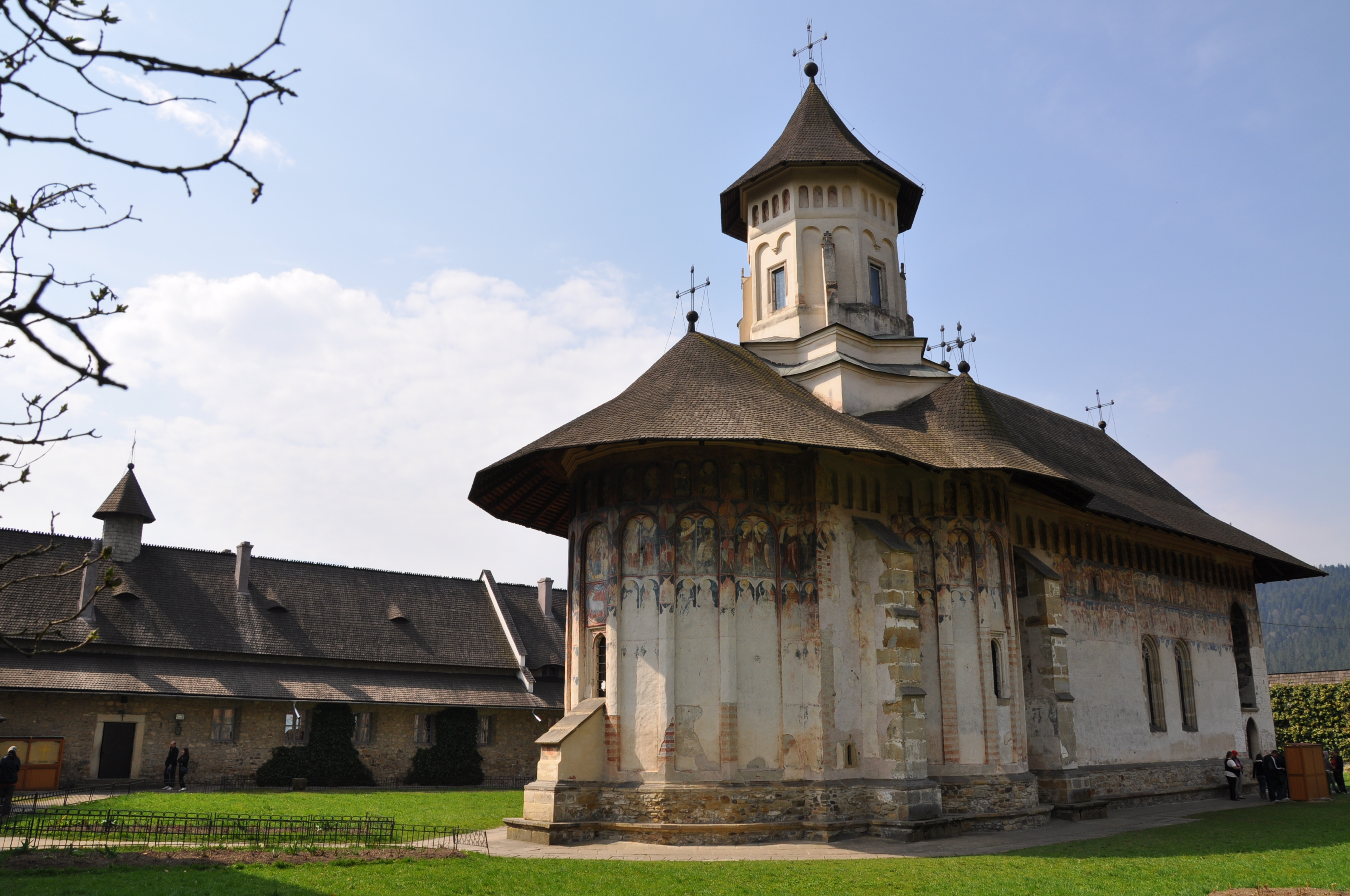 Mănăstirea Moldovița